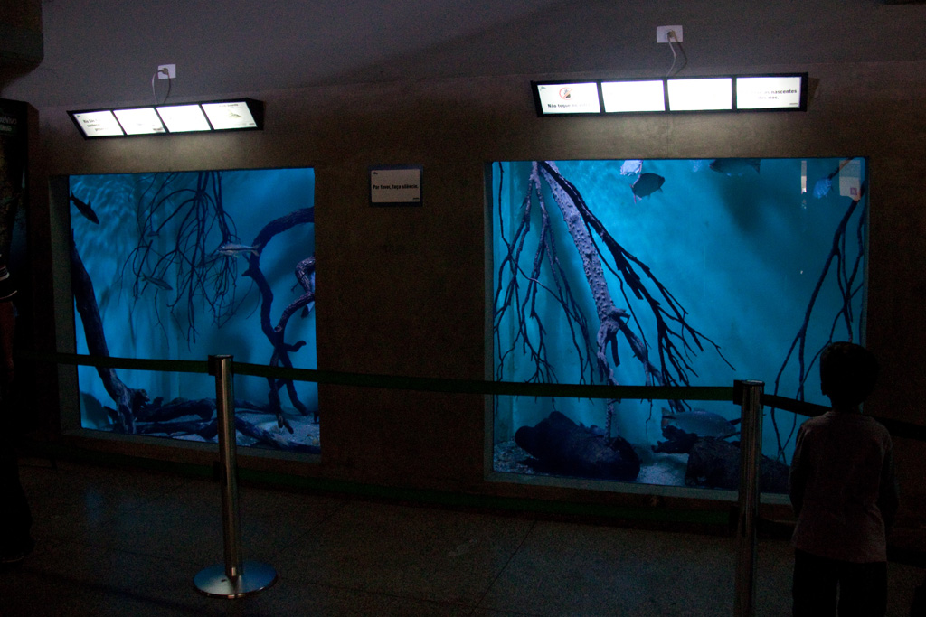 Tanques do Aquário de Belo Horizonte.